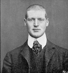 Dr. Archibald Rudolph Reiss